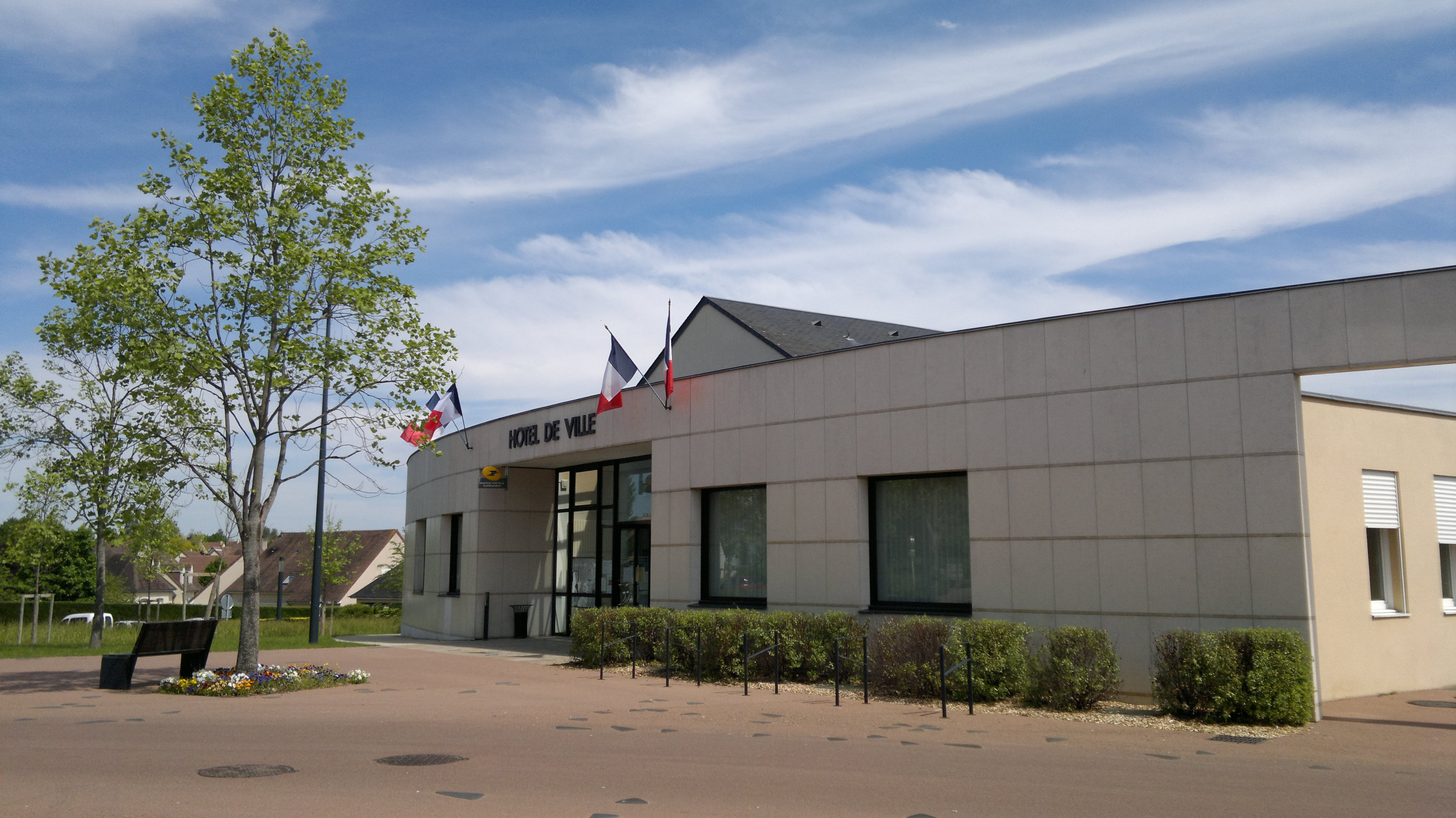 Rouillon est une commune française, située dans le département de la Sarthe et la région Pays de la Loire.